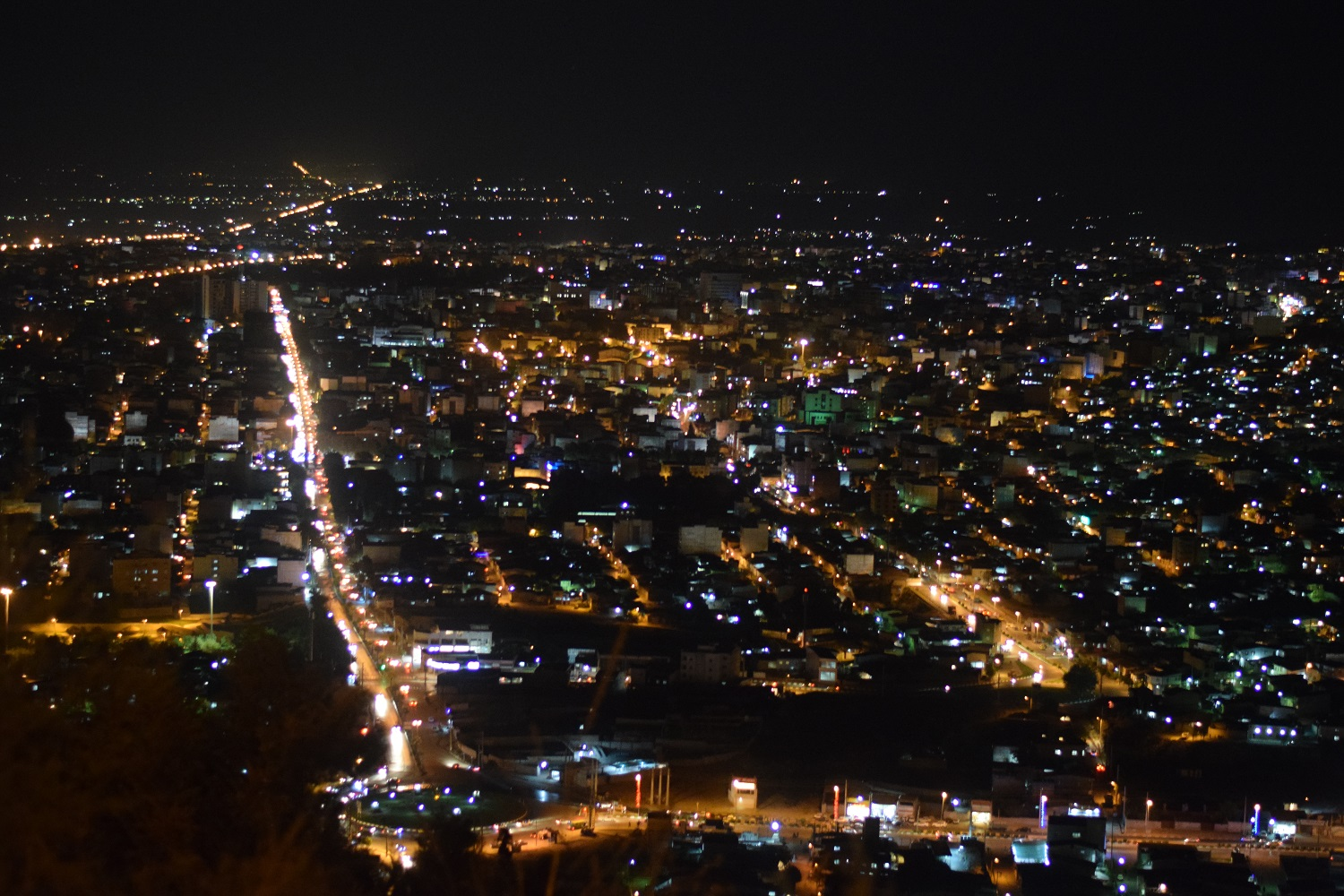 تفرجگاه هزارپیچ